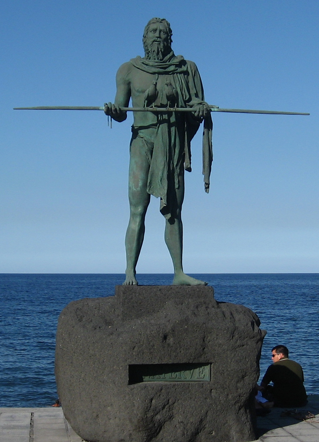 Escultura al Mencey Añaterve en Candelaria, Canarias, España. Escultor: José Abad